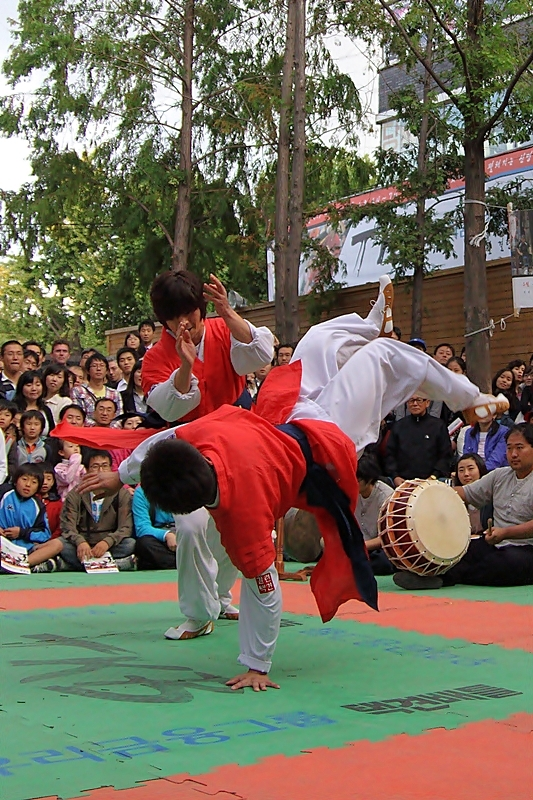 인사동 택견배틀에서 결련택견협회 황인무, 정주렬이 시연으로 날치기를 선보이고 있다.